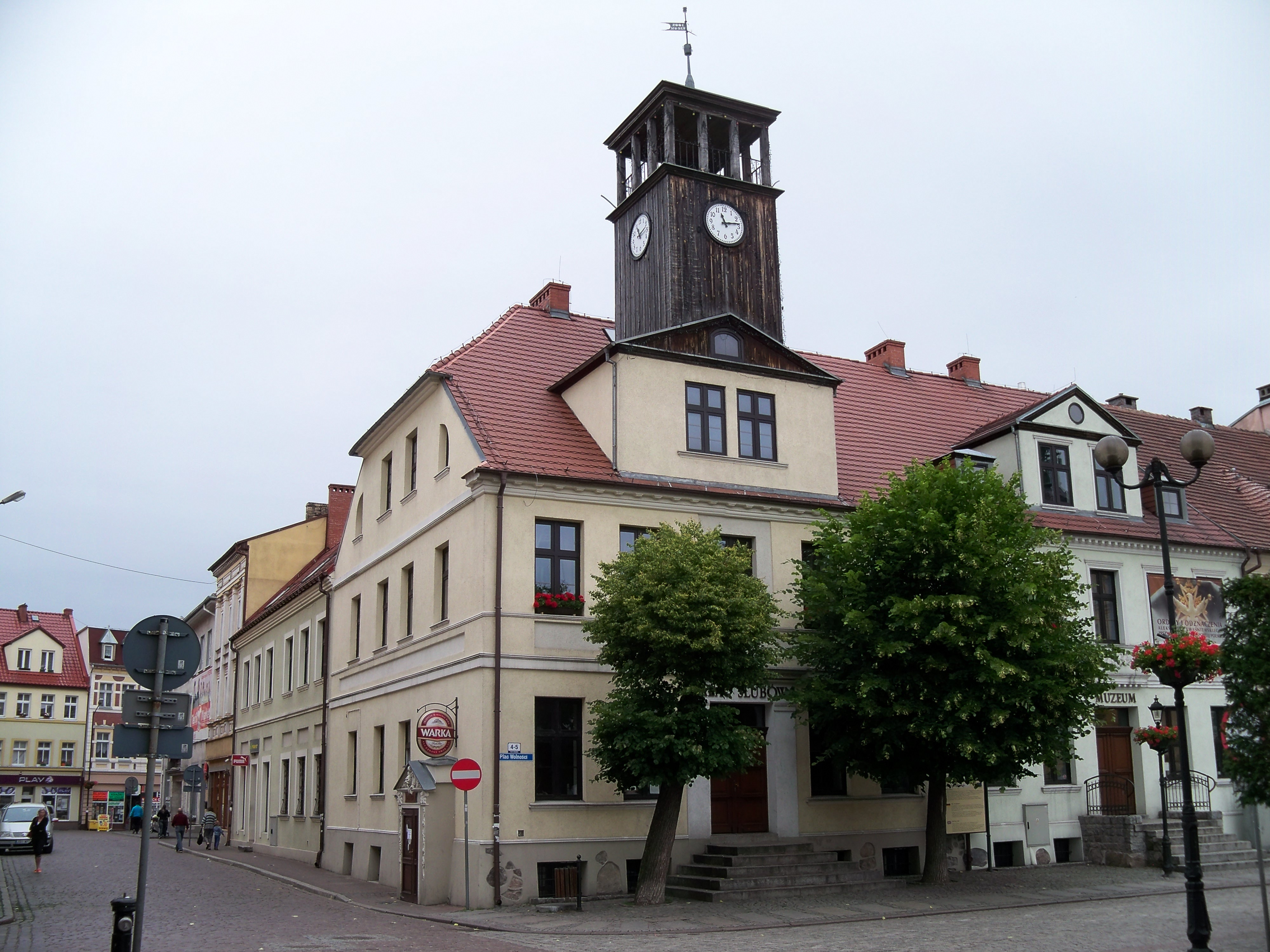 Białogard - stary ratusz przy Placu Wolności.